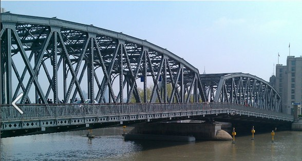 中文（中国大陆）: 外白渡桥2010.4